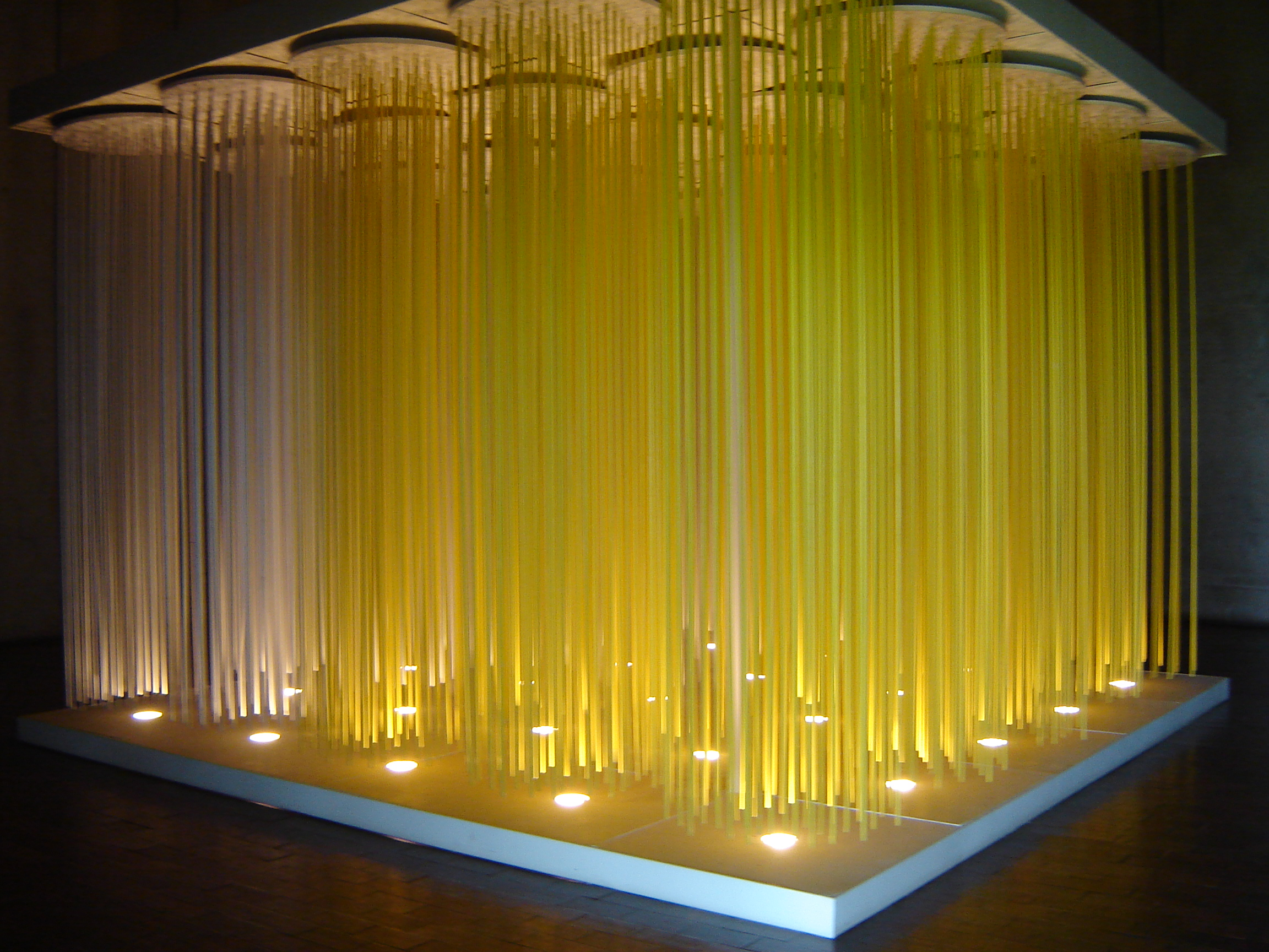 Soto´s movement sculpture